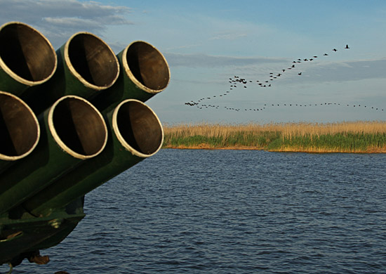 Проекта 1204 "Шмель" - Дивизионом артиллерийских катеров охраны водного района Каспийской флотилии